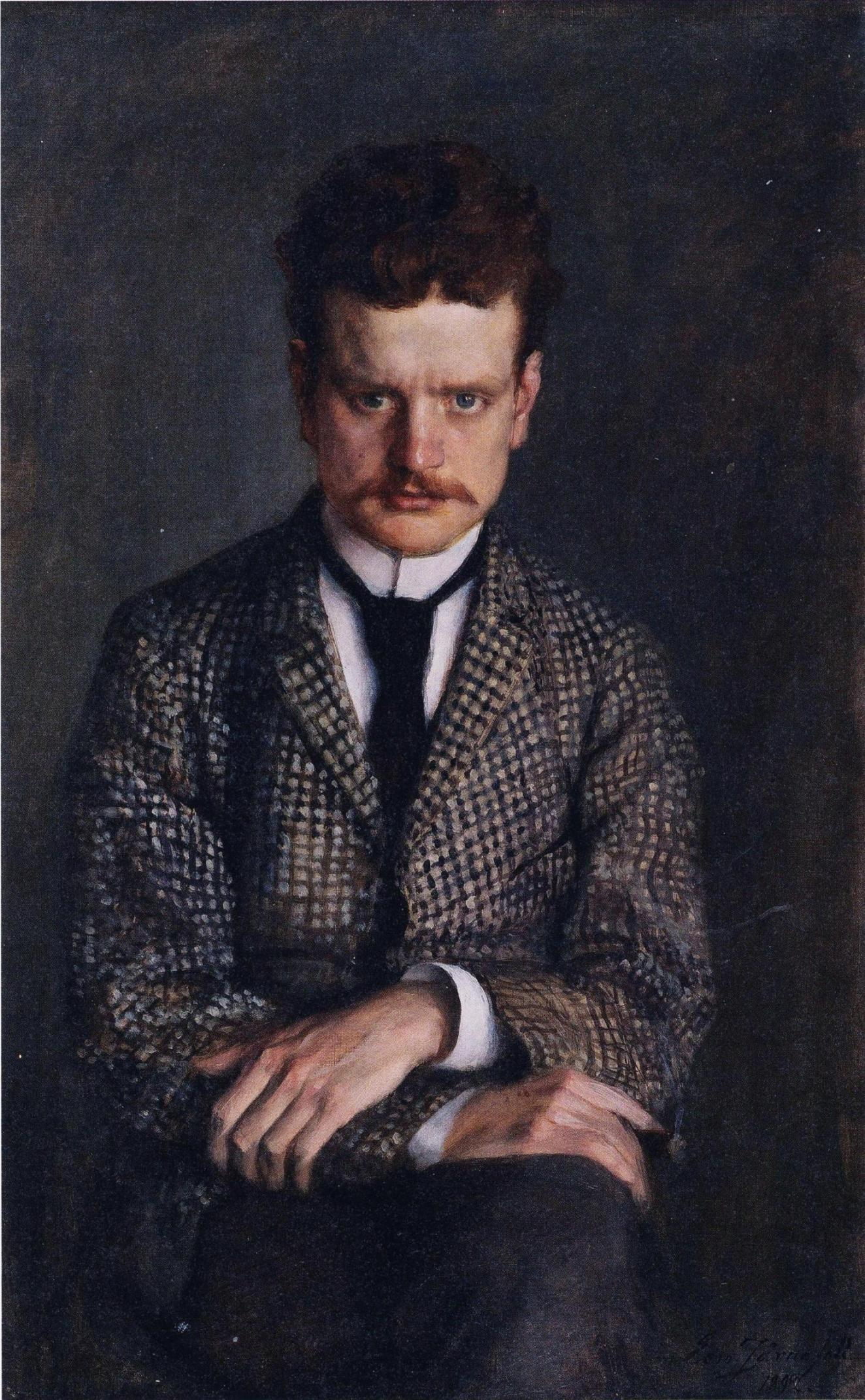 Eero Järnefeltin maalaama muotokuva langostaan, säveltäjä Jean Sibeliuksesta. Teos kuuluu yksityiskokoelmaan.